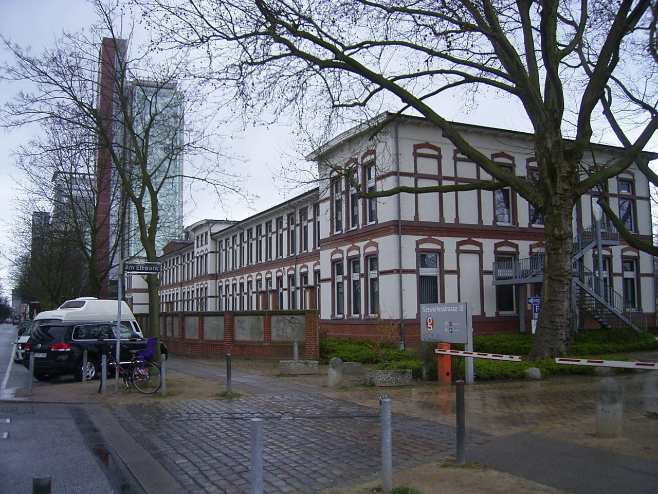 Das ehemalige Hafenkrankenhaus an der Seewartenstraße in Sankt Pauli wurde 1898 bis 1900 erbaut. Heute befindet sich das Gesundheitszentrum St. Pauli in den Gebäuden.